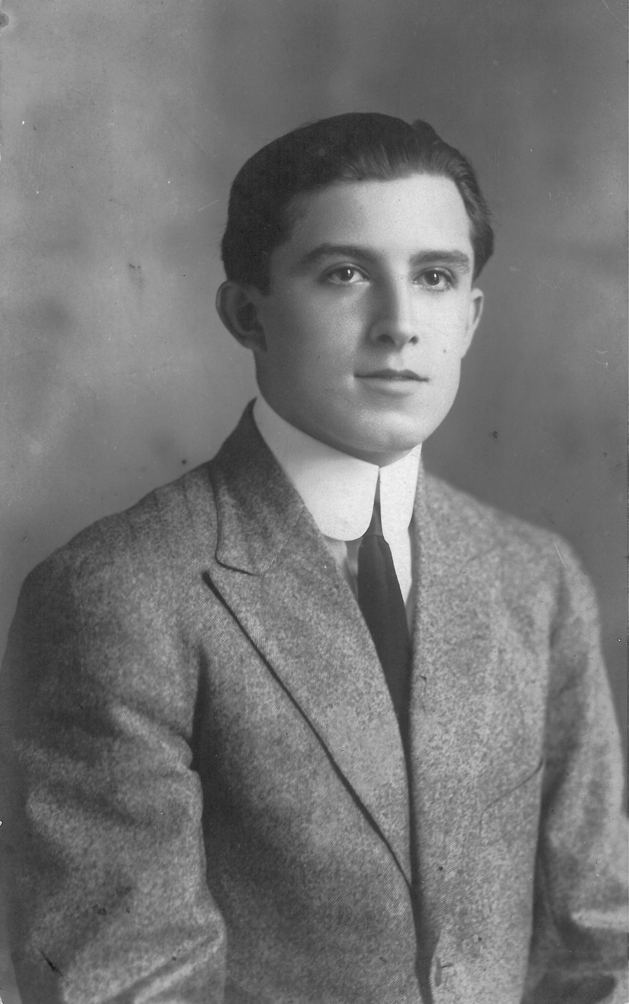 Mariano Brull cuando se graduó de la Universidad de La Habana en 1913